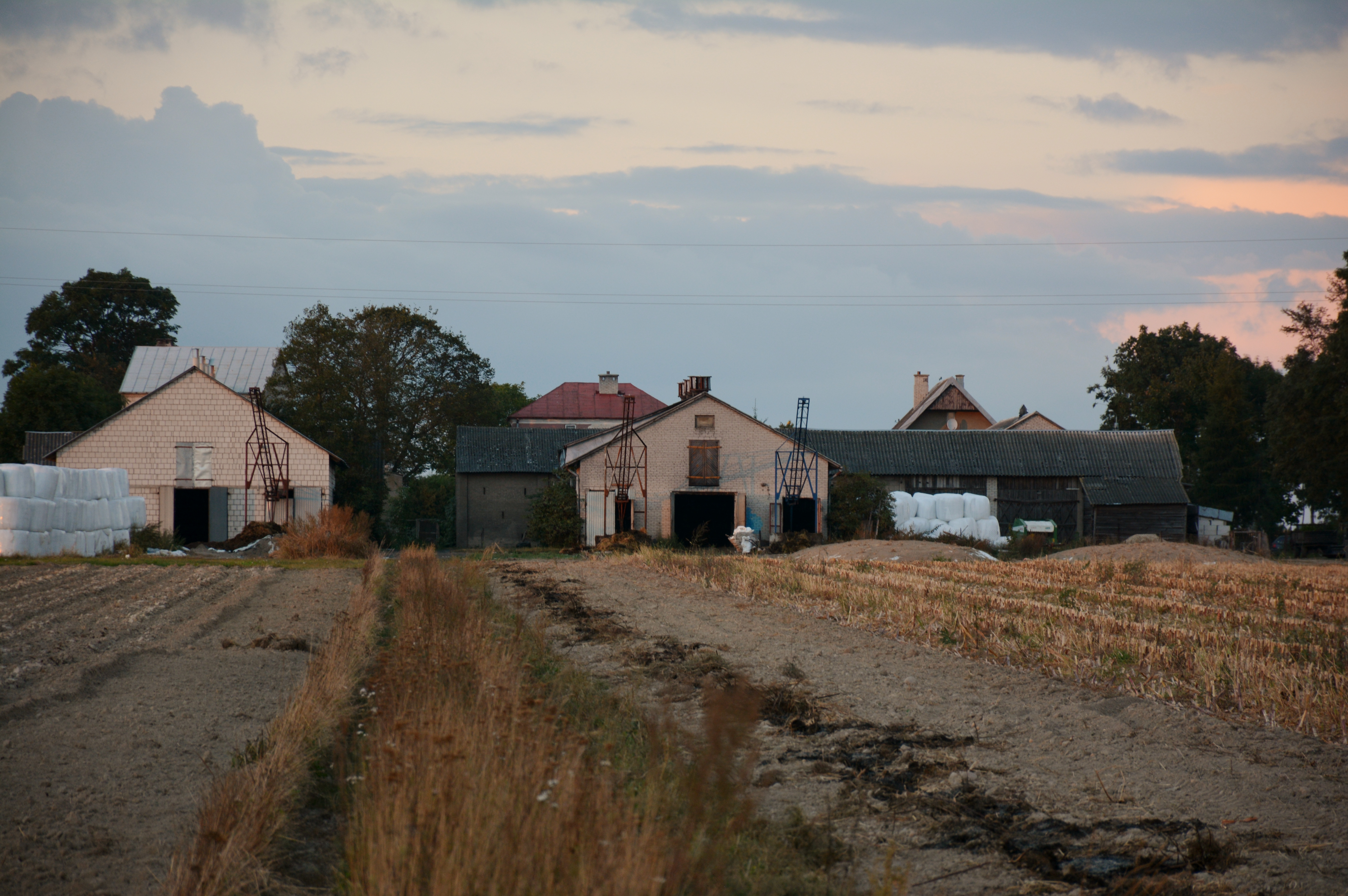 Prochenki,Gmina Olszanka,Polska UE.